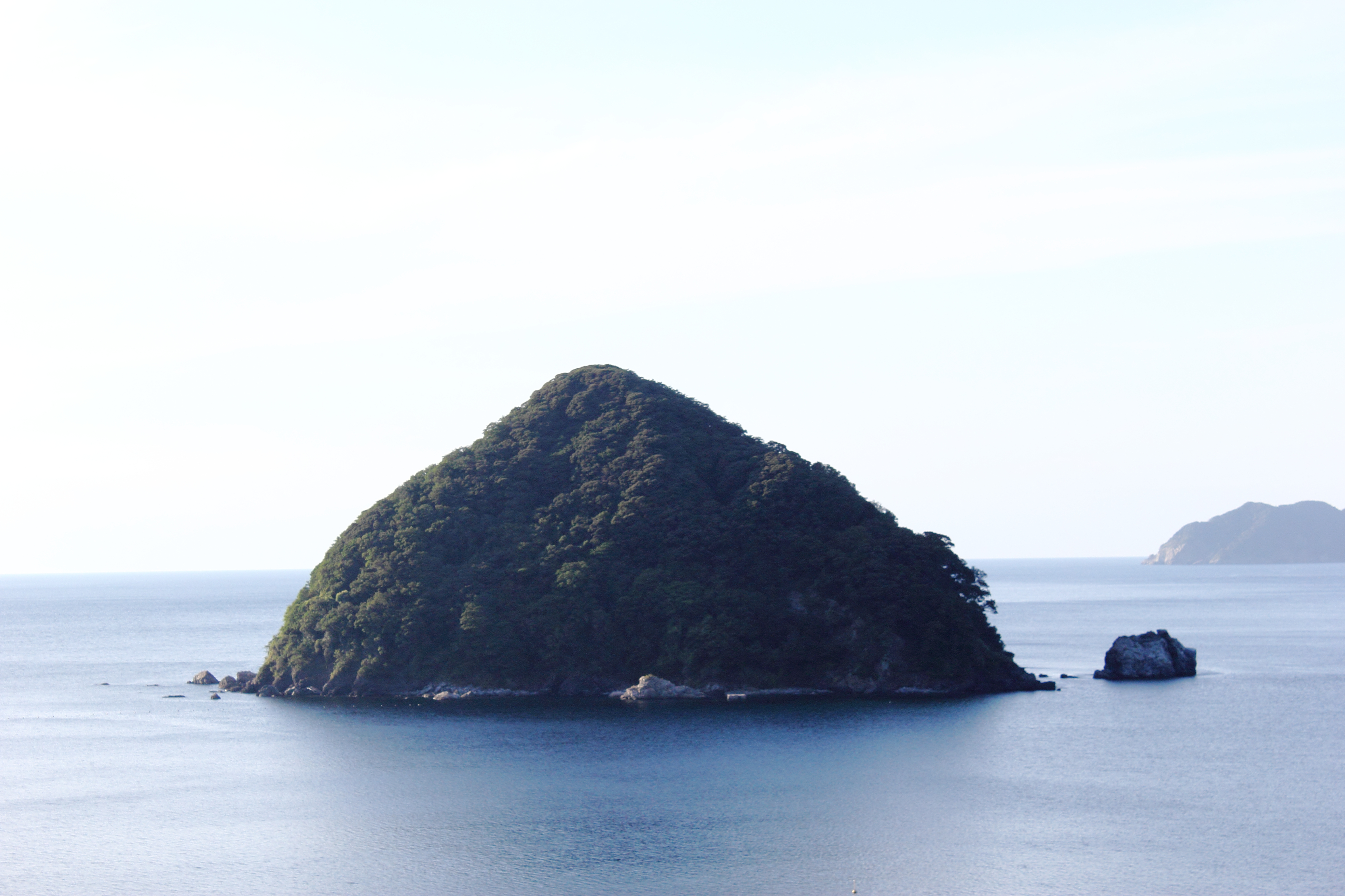 世久見湾内にある鳥辺島